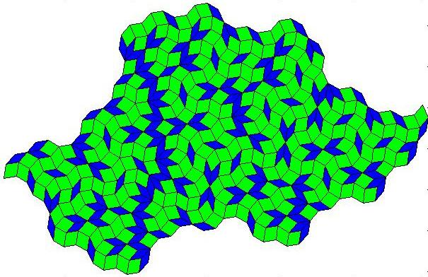 dekoratív mintázat a Penrose-csempék felhasználásával.